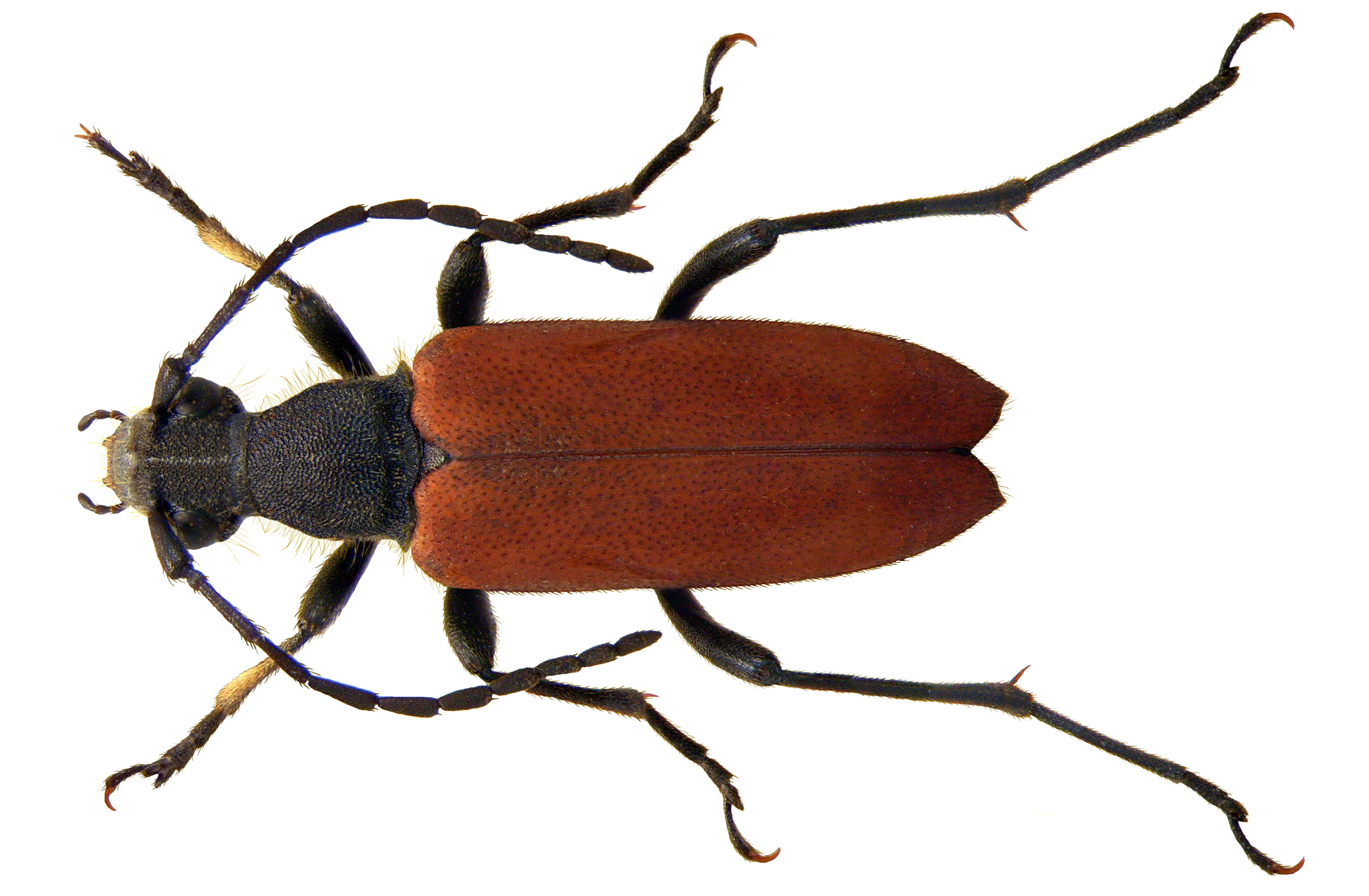 Familie: Cerambycidae Groesse: 9-13 mm Verbreitung: Europa Ökologie: Entwicklung in Nadelholz Fundort: Italien, Südtirol, Brixen, Vahrner See leg.det. U.Schmidt, 1973 Photo: U.Schmidt, 2009